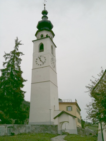 Kirchturm der reformierten Kirche Ftan im Unterengadin